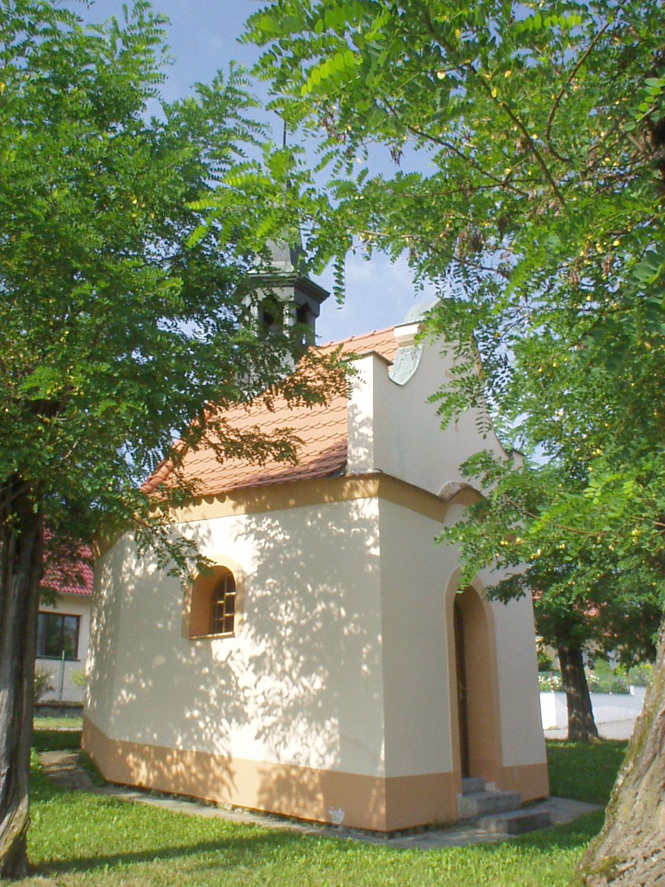 kaple v Čečelovicích